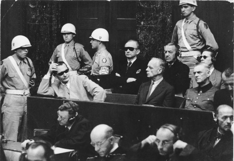 Zentralbild Strafprozess vor dem Internationalen Militärgerichtshof in Nürnberg vom 20.11.1945 bis 1.10.1946 gegen führende Personen (Hauptkriegsverbrecher) des faschistischen Deutschlands wegen Kriegsverbrechen, Verbrechen gegen den Frieden und gegen die Menschlichkeit; abgeschlossen durch Urteil vom 30.9/1.10.1946. UBz: Die Bank der Angeklagten; von links: Hermann Göring, Karl Dönitz, Joachim von Ribbentrop, Erich Raeder, Wilhelm Keitel, dahinter Baldur von Schirach, Ernst Kaltenbrunner. Abgebildete Personen: Dönitz, Karl: Großadmiral, Ritterkreuz (RK), Marine, Oberbefehlshaber der Kriegsmarine, Deutschland (GND 118526251) Göring, Hermann: Reichsmarschall, Oberbefehlshaber der Luftwaffe, Ministerpräsident von Preußen, Deutschland Kaltenbrunner, Ernst Dr. jur.: SS, Ritterkreuz (RK), Chef des Reichssicherheitshauptamtes, Deutschland Keitel, Wilhelm: Generalfeldmarschall, Ritterkreuz (RK), Heer, Deutschland (GND 118721577) Raeder, Erich: Großadmiral, Oberbefehlshaber der Kriegsmarine, Deutschland (GND 118743511) Ribbentrop, Joachim von: Außenminister, NSDAP, Deutschland Schirach, Baldur von: Reichsjugendführer, Gauleiter von Wien, Nürnberger Prozeß, Deutschland